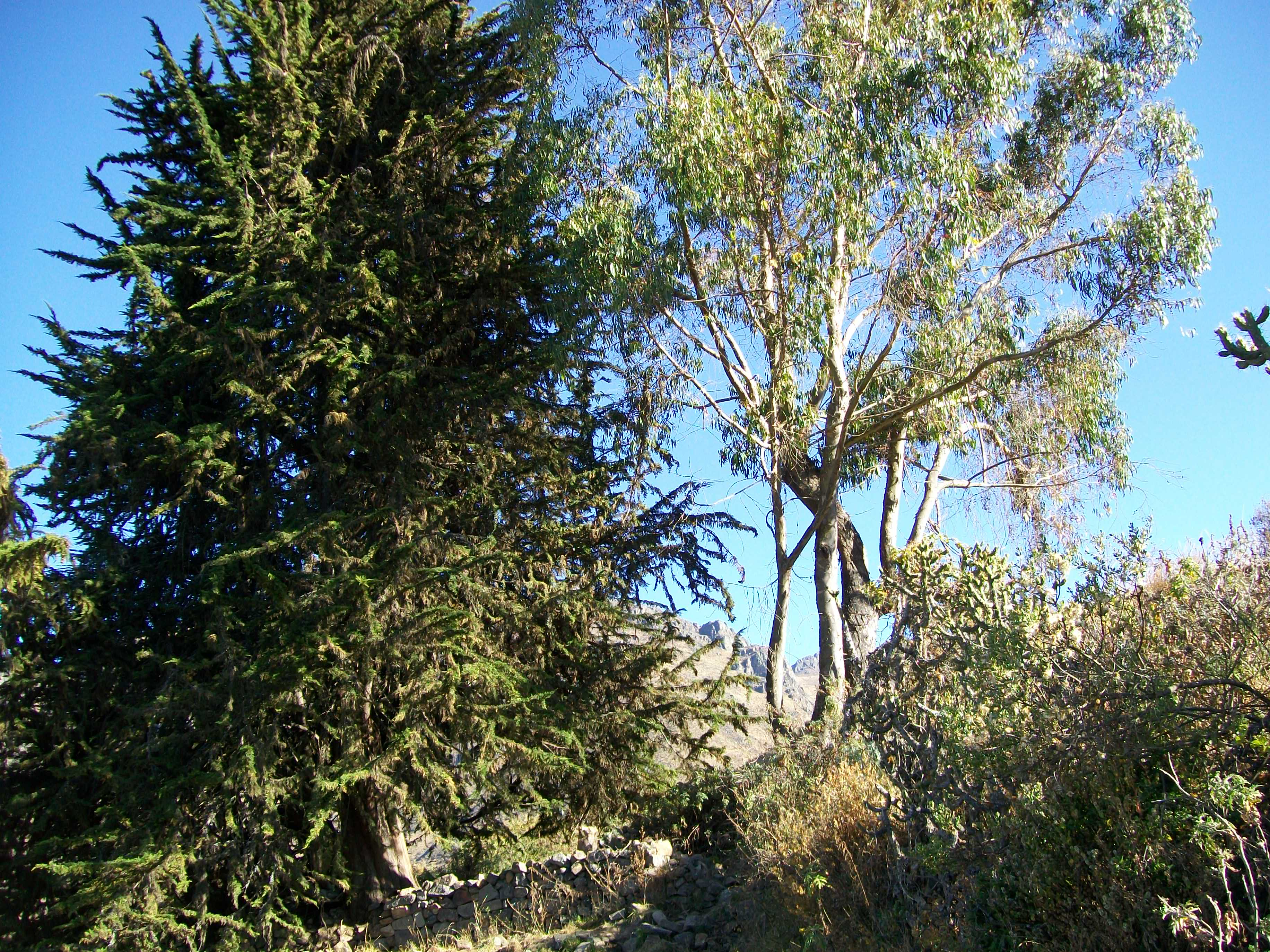 Ruinas de Chinches (Ocros),Ancash. País: Perú Fotografo:© Edgar Amador Espinoza Montesinos Fecha:8 de Enero de 2008